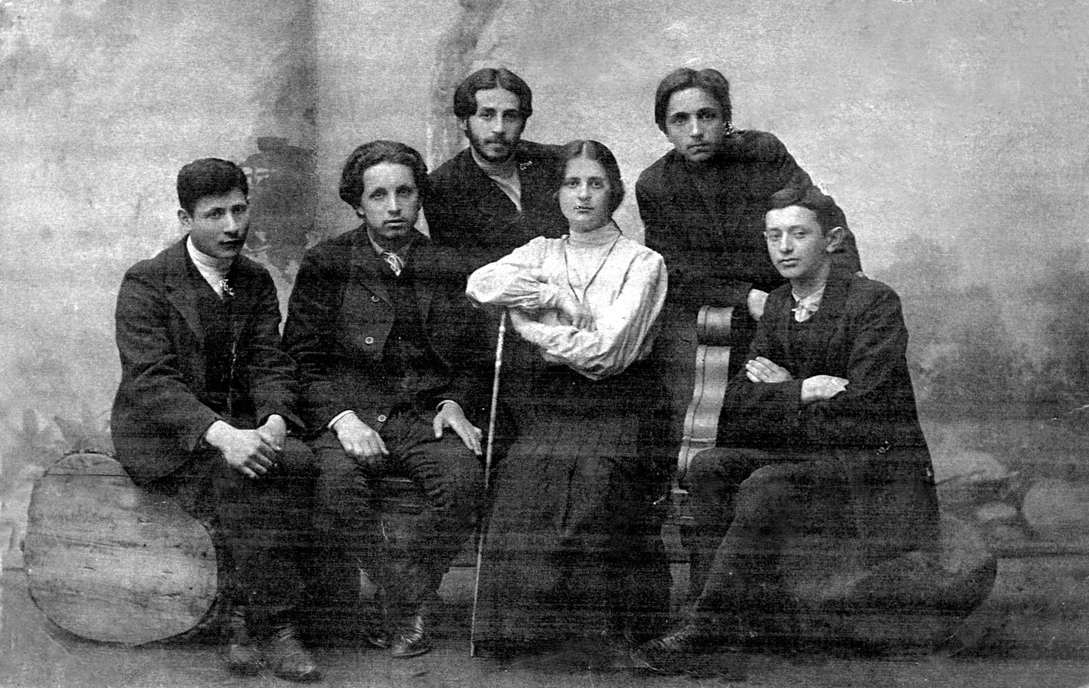 קבוצה של פועלי ציון מוורשה בשנת 1905 עומדים מימין לשמאל אליעזר סלוצקין ויצחק טבנקין יושבים מימים לשמאל מכס, אווה טבנקין אחותו של יצחק טבנקין יוסף זלצמן ואלקנה הורוביץ